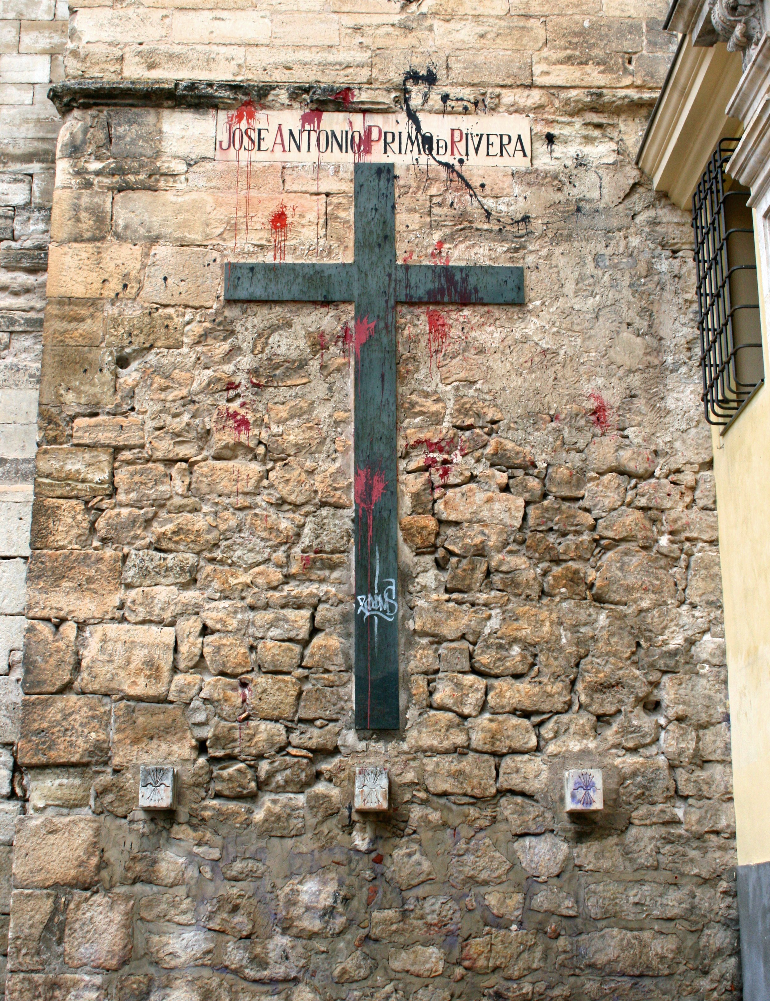 Cruz conmemorativa de José Antonio Primo de Rivera en un lateral de la catedral de Cuenca (España).